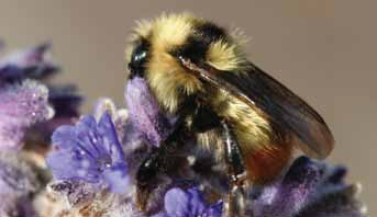 Bombus centralis, queen